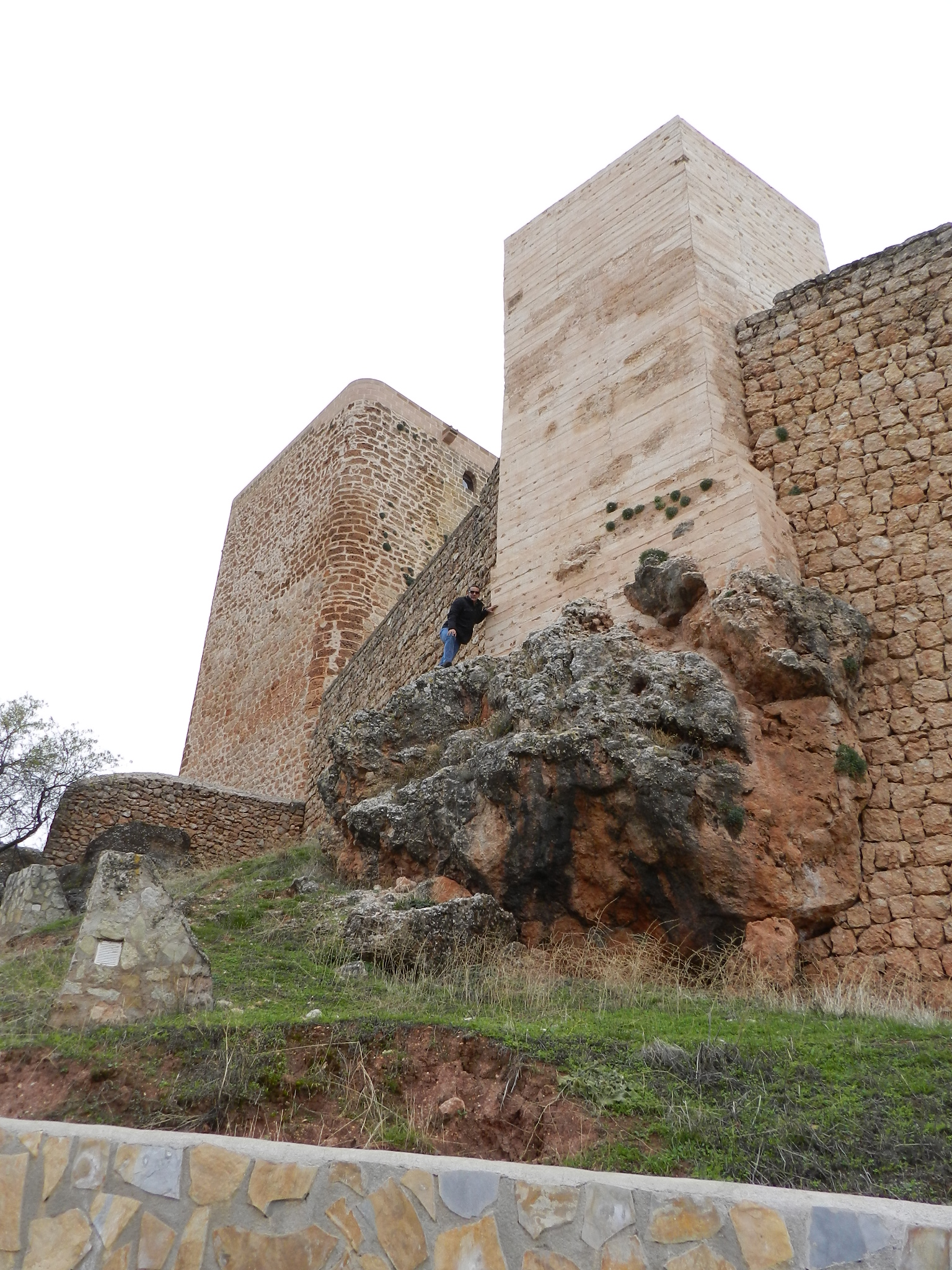 Castillo restaurado de Hornos de Segura